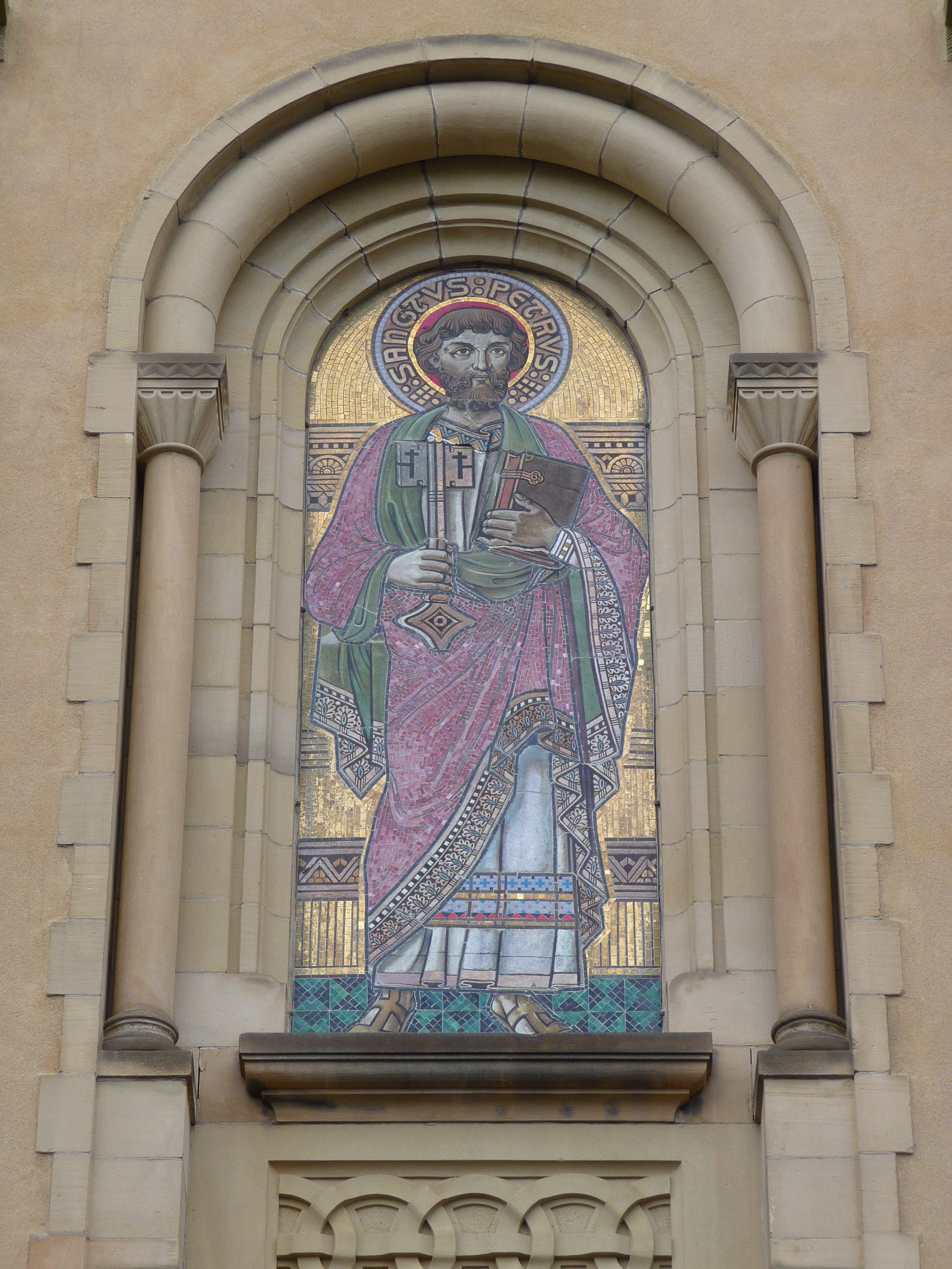 Darstellung des Heiligen Petrus am Hauptportal der katholischen Kirche St. Peter im Heidelberger Stadtteil Kirchheim